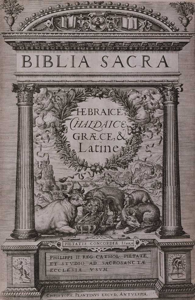 Portada del primer tomo de la Biblia Sacra o Biblia Regia impresa en Amberes